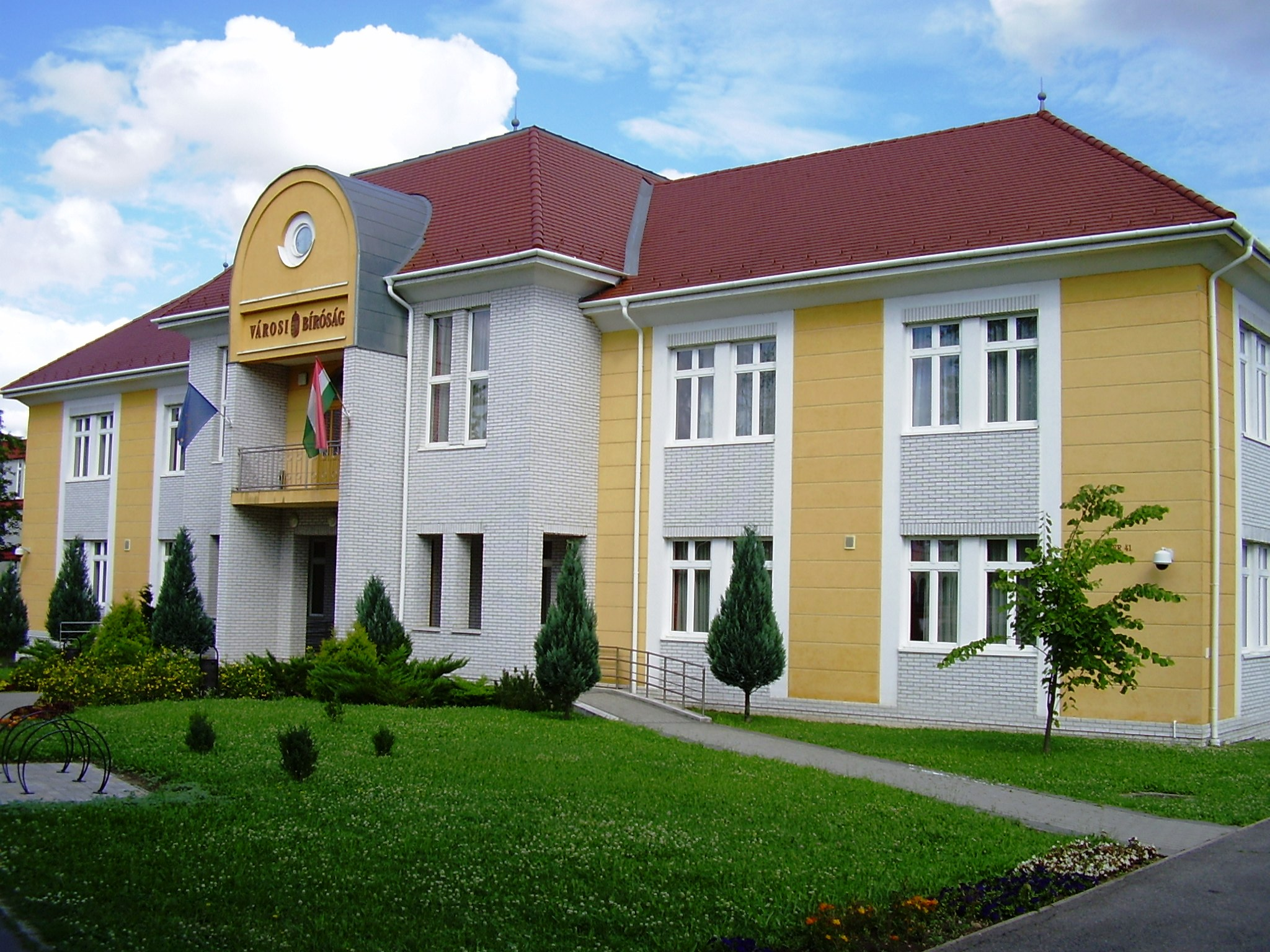 A Városi Bíróság épülete Kazincbarcikán. Kazincbarcika, Fő tér 41.